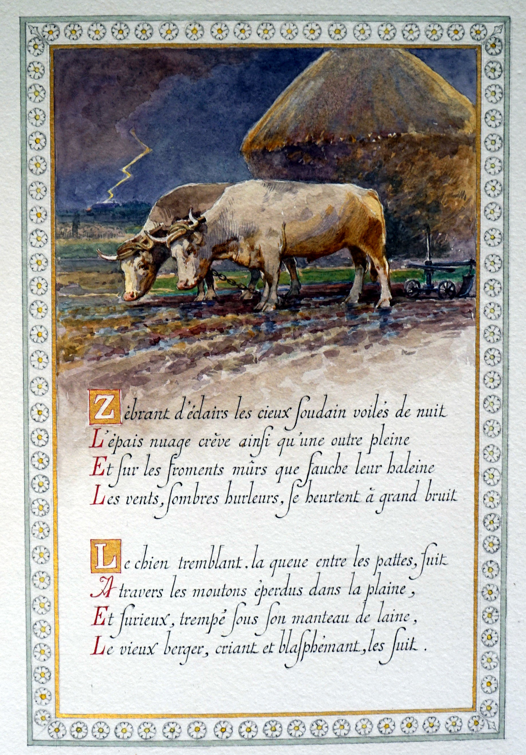 oeuvre calligraphiée et décorée par Auger pour Diancourt.